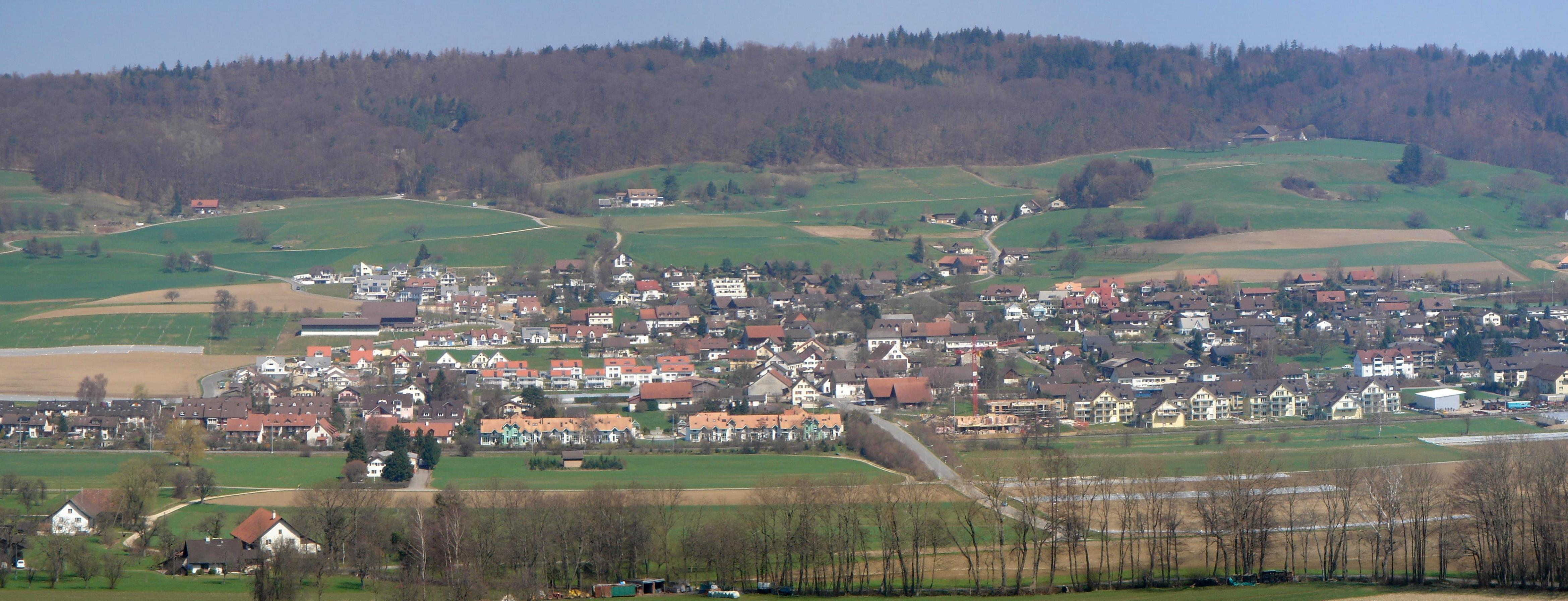 Oberweningen, Kanton Zurich, Switzerland